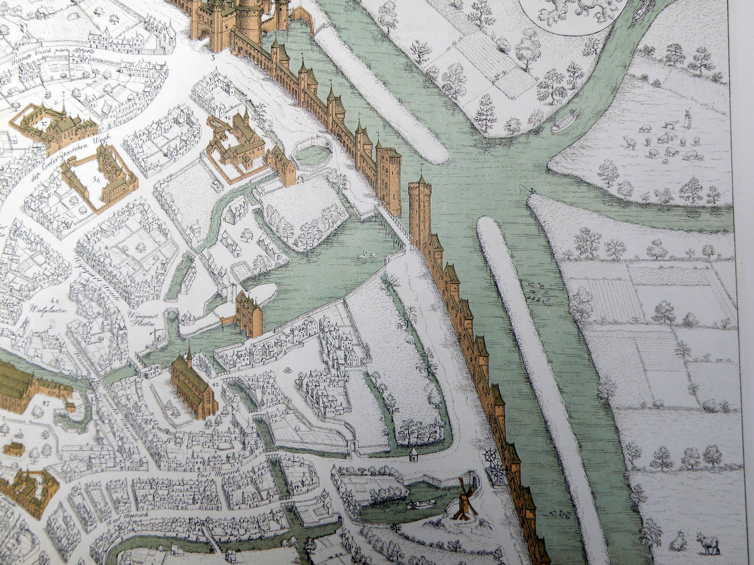 Plan van Brugge (1562) door Marcus Gerardus (of Marcus Gerards, Marc Gheeraerts). Close-up van het zuidelijke deel van Brugge (rond begijnhof).